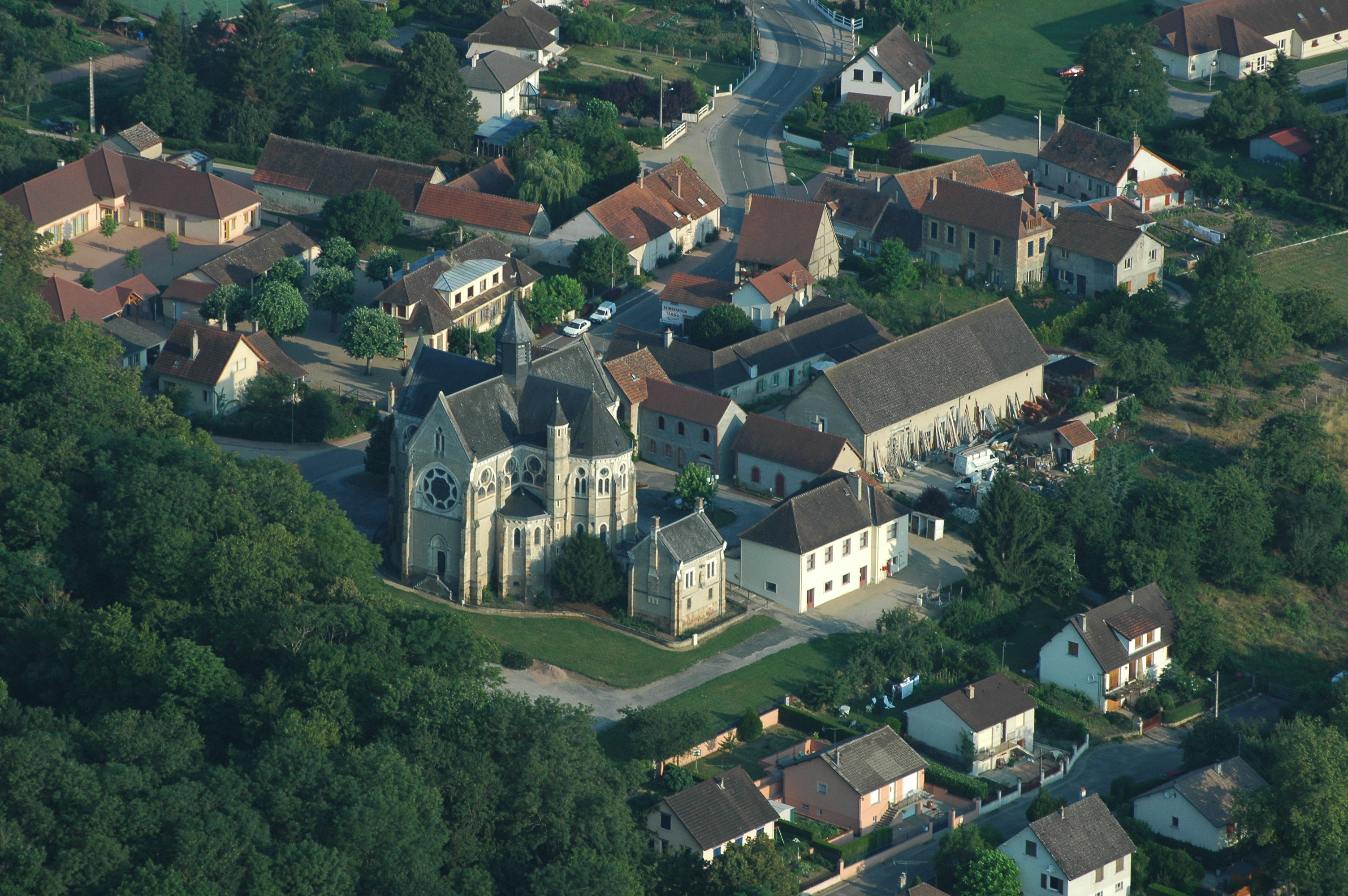 L'église à Bressolles, Allier, France